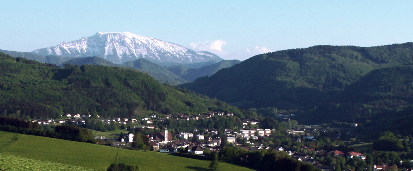 scheibbs